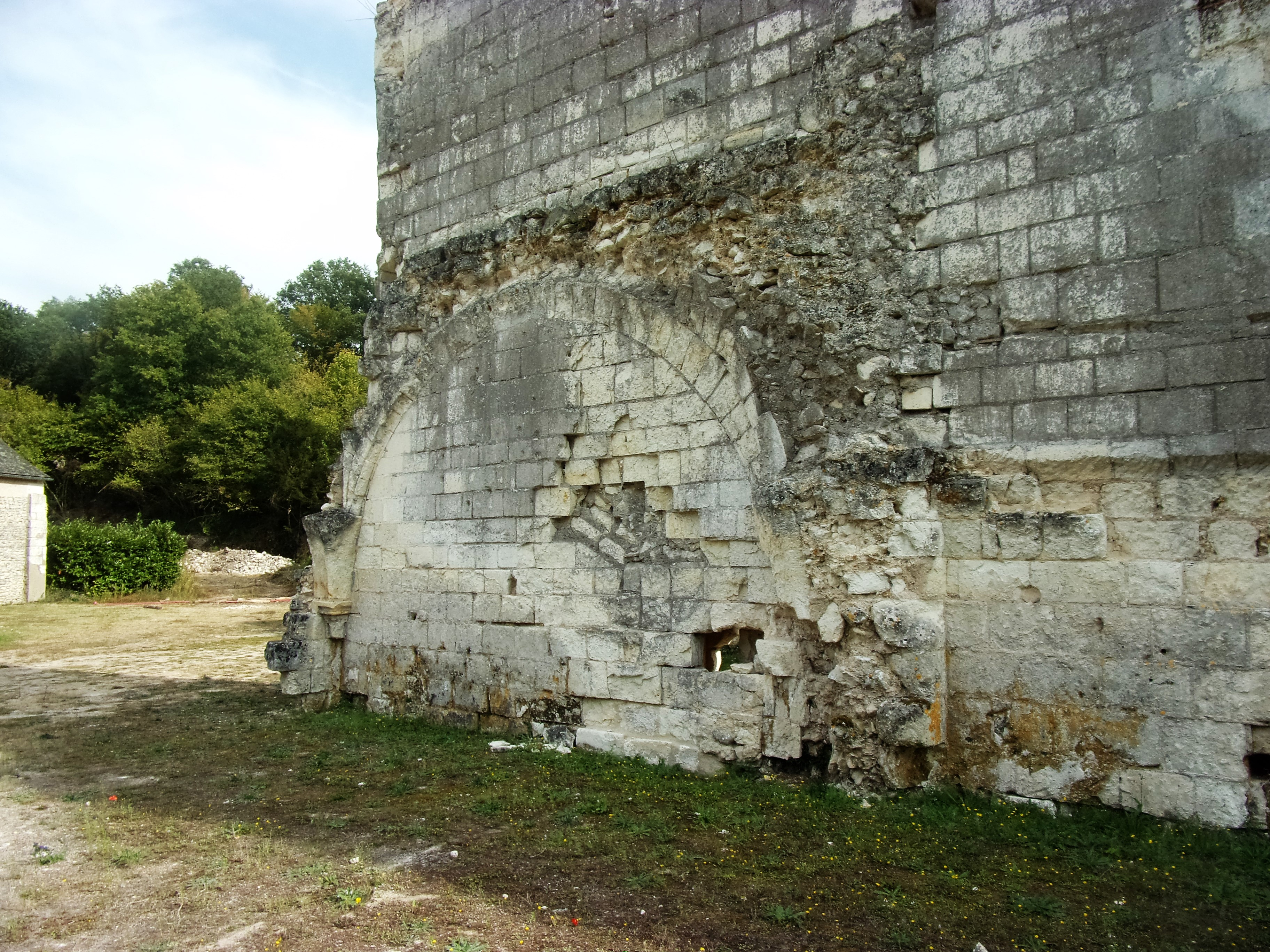 Vestiges du petit cloître de la chartreuse